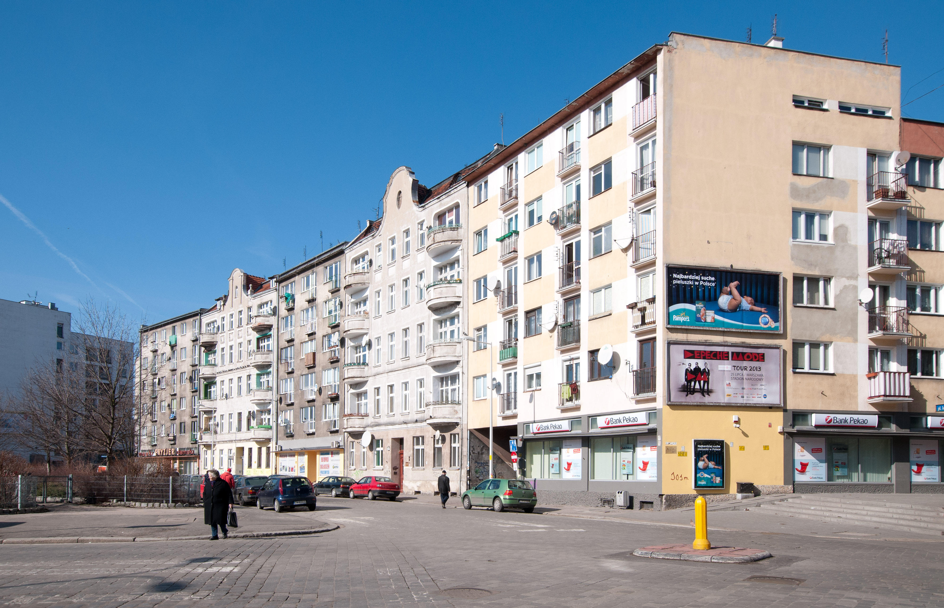 Budynki przy pl. Icchaka Lejba Pereca we Wrocławiu. Widok ze skrzyżowania ulic Szczęśliwej i Pereca.